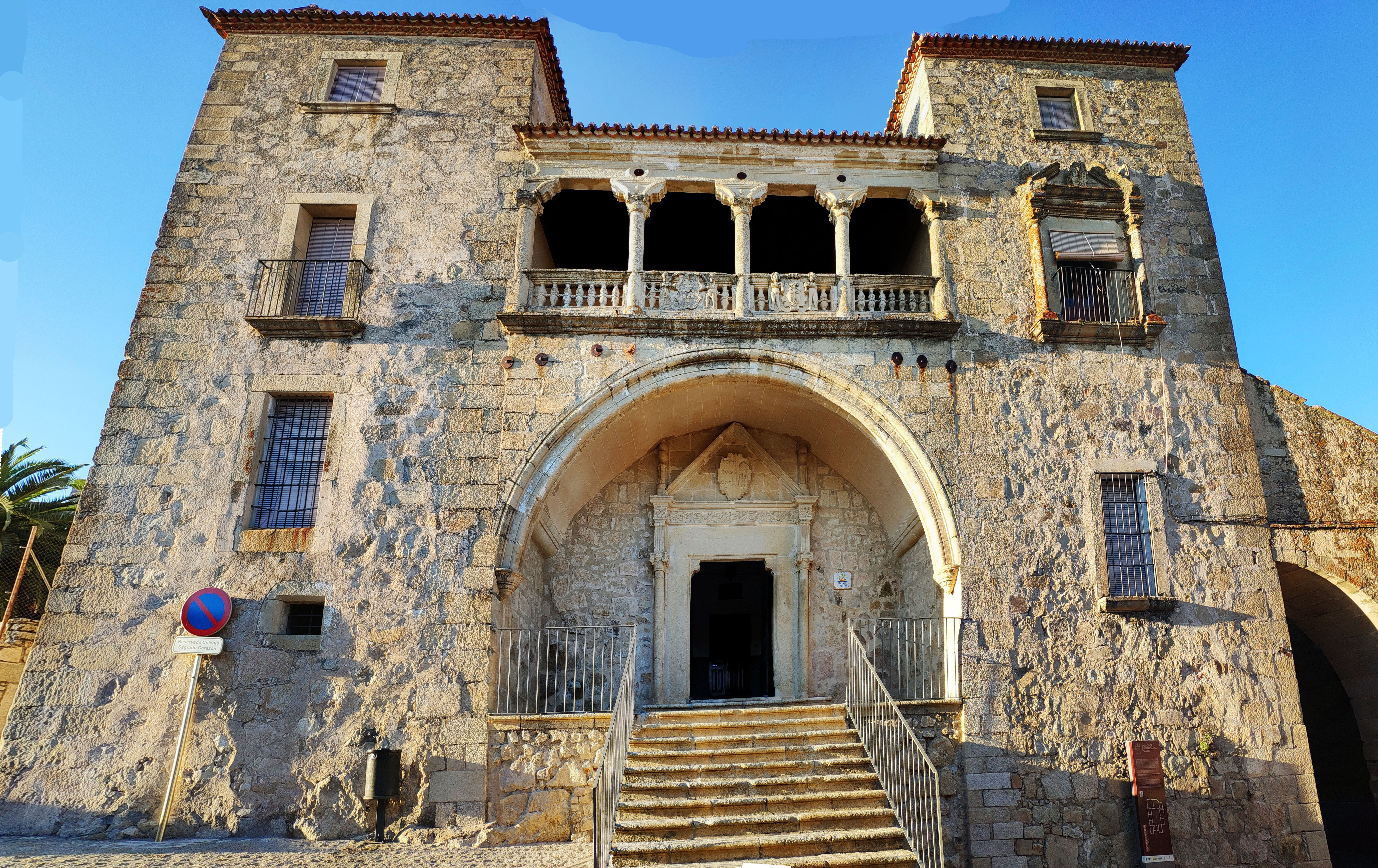 Palacio Juan Pizarro de Orellana, en Trujillo, provincia de Cáceres, Extremadura, España.